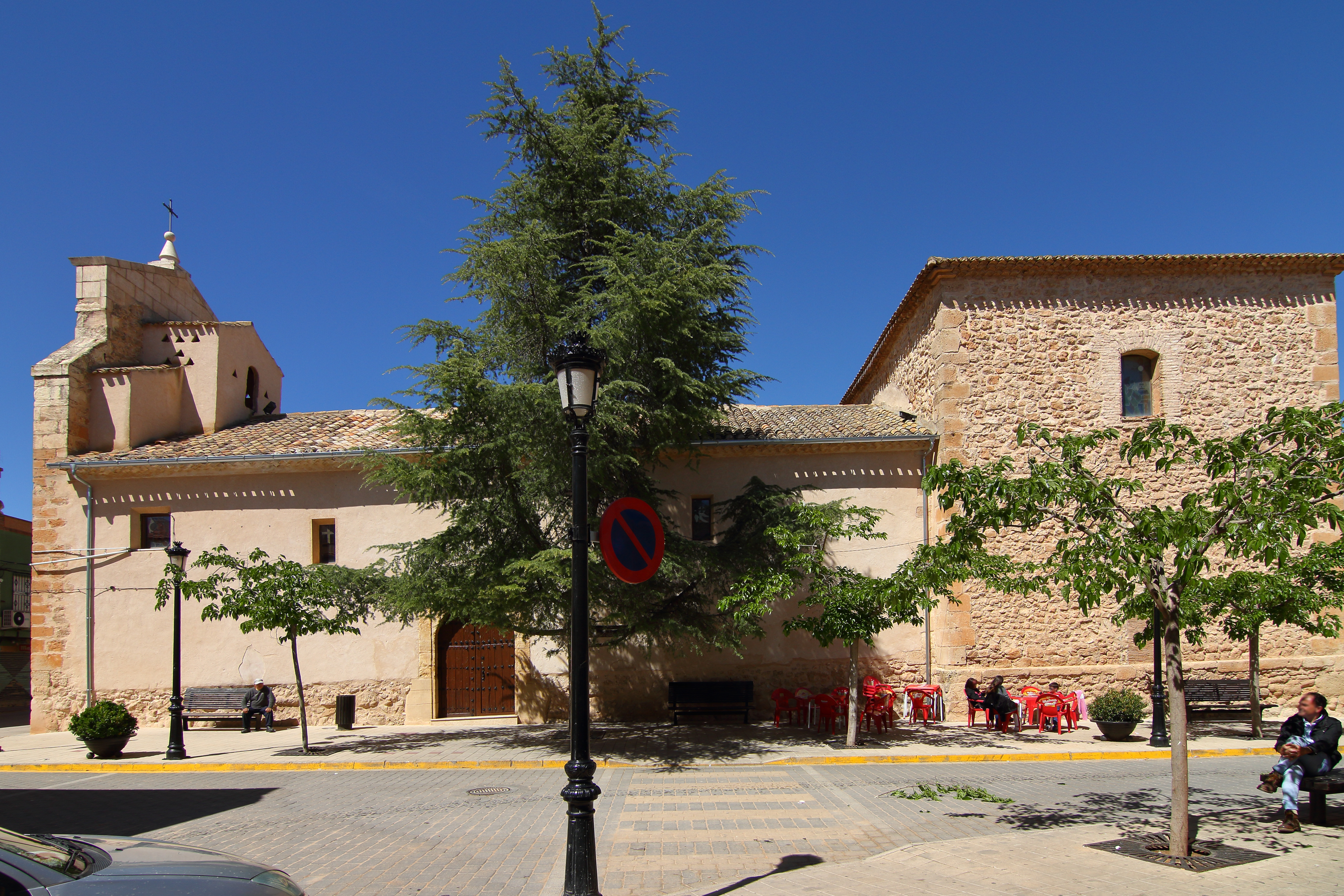 La Pesquera, Iglesia de Purificación de María, fachada principal